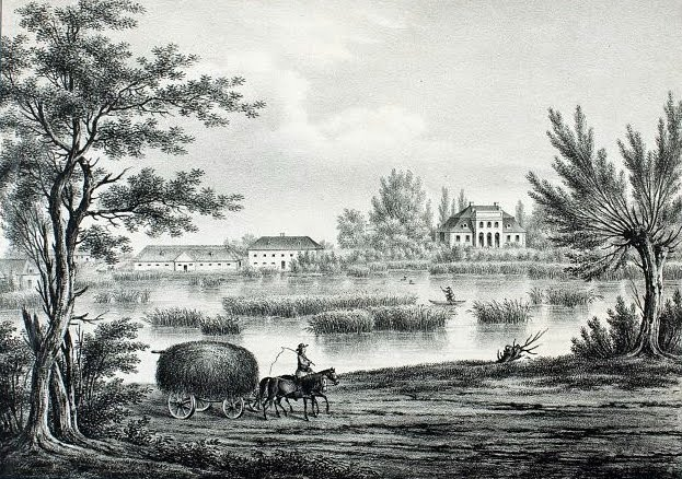 Гравюра XIX століття, на якій зображене село Сторонибаби